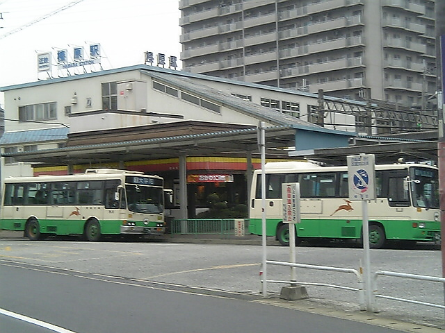 榛原駅南口です。